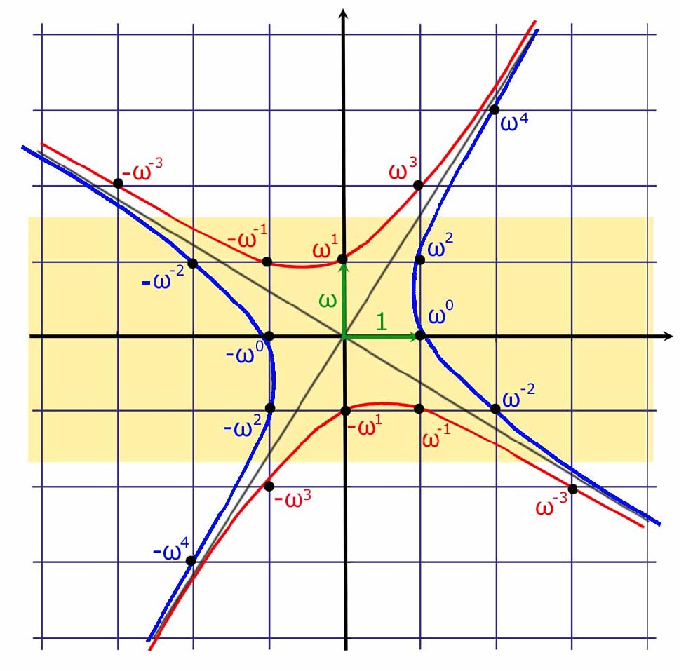 Fichier représentant le groupe de l'unité dans l'anneau des entiers de Dirichlet associé à l'équation de Pell. Je suis l'auteur de la figure. Jean-Luc W 30 octobre 2006 à 23:56 (CET)